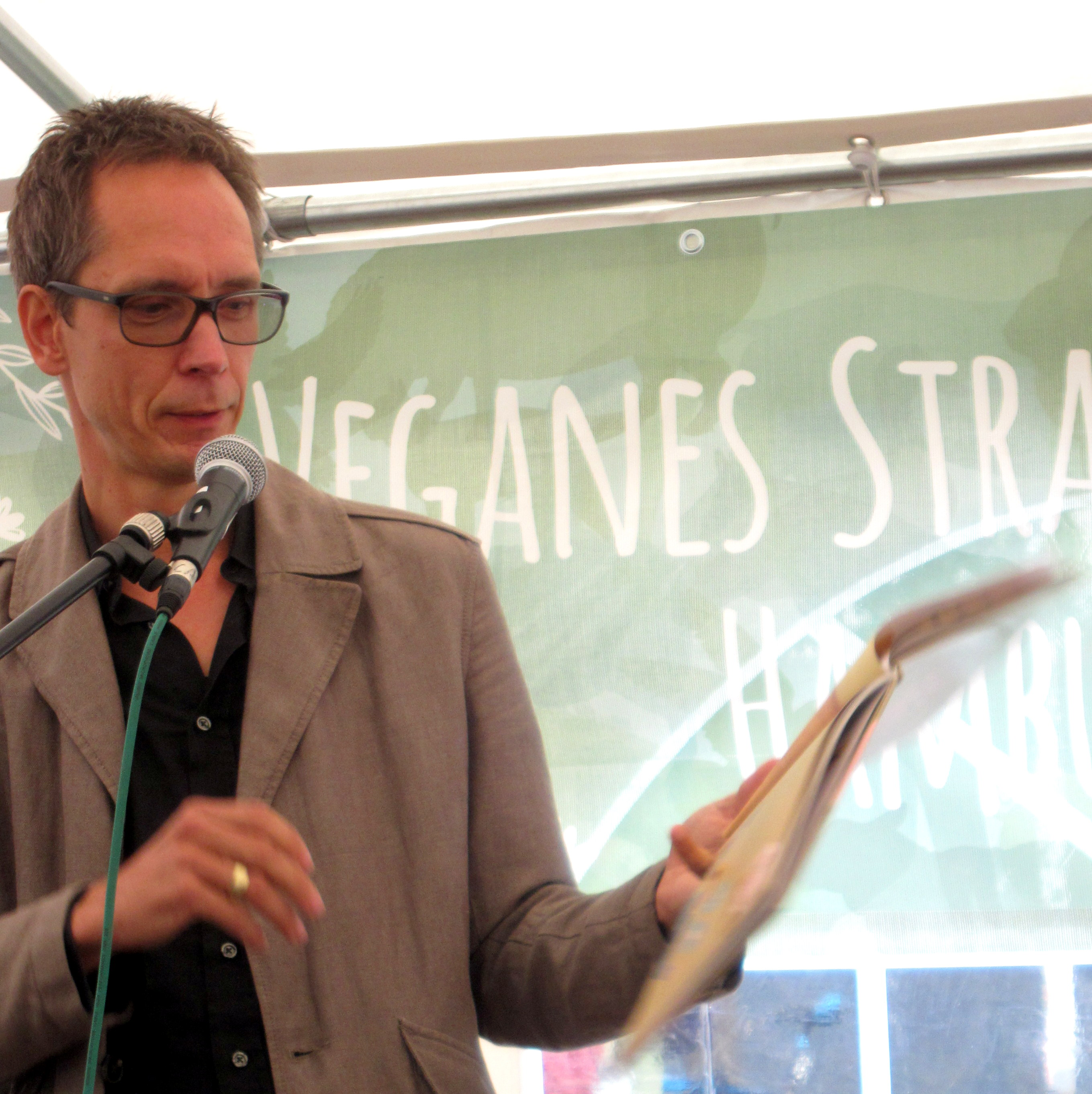 Udo Taubitz liest beim Veganen Sommerfest 2017 in Hamburg aus seinem Kinderbuch "Schweinchen Schlau - Mein Papa gehört mir!"